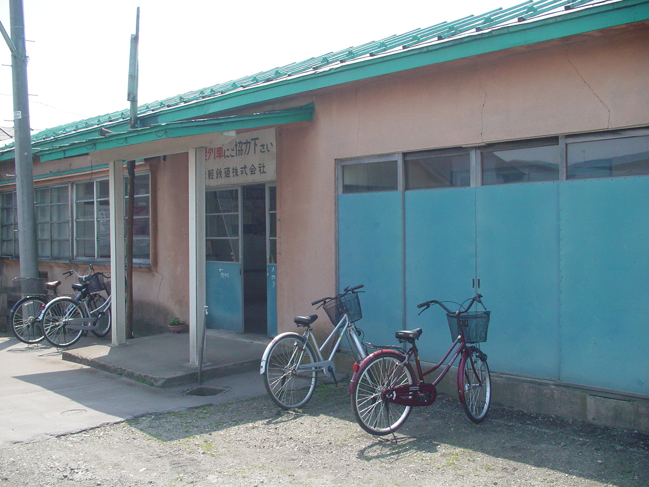 （津軽鉄道線大沢内駅）